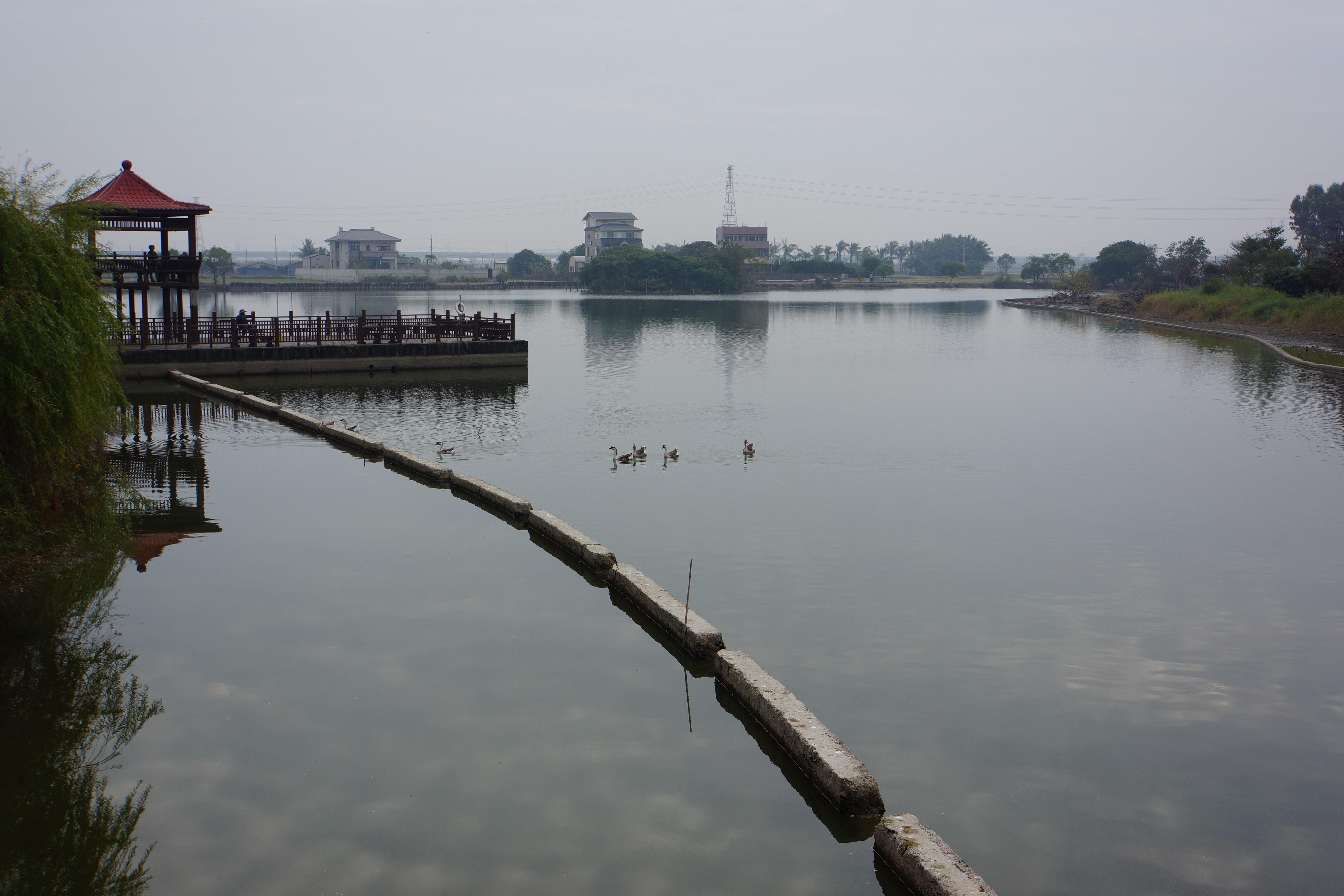 新營天鵝湖 Xinying Swan Lake